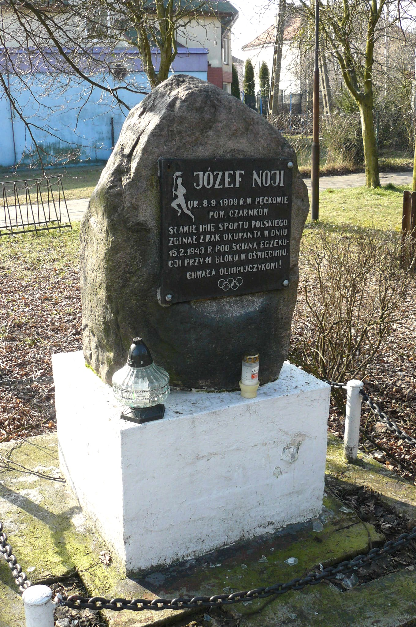 Drawski Młyn. Pomnik Józefa Noji.